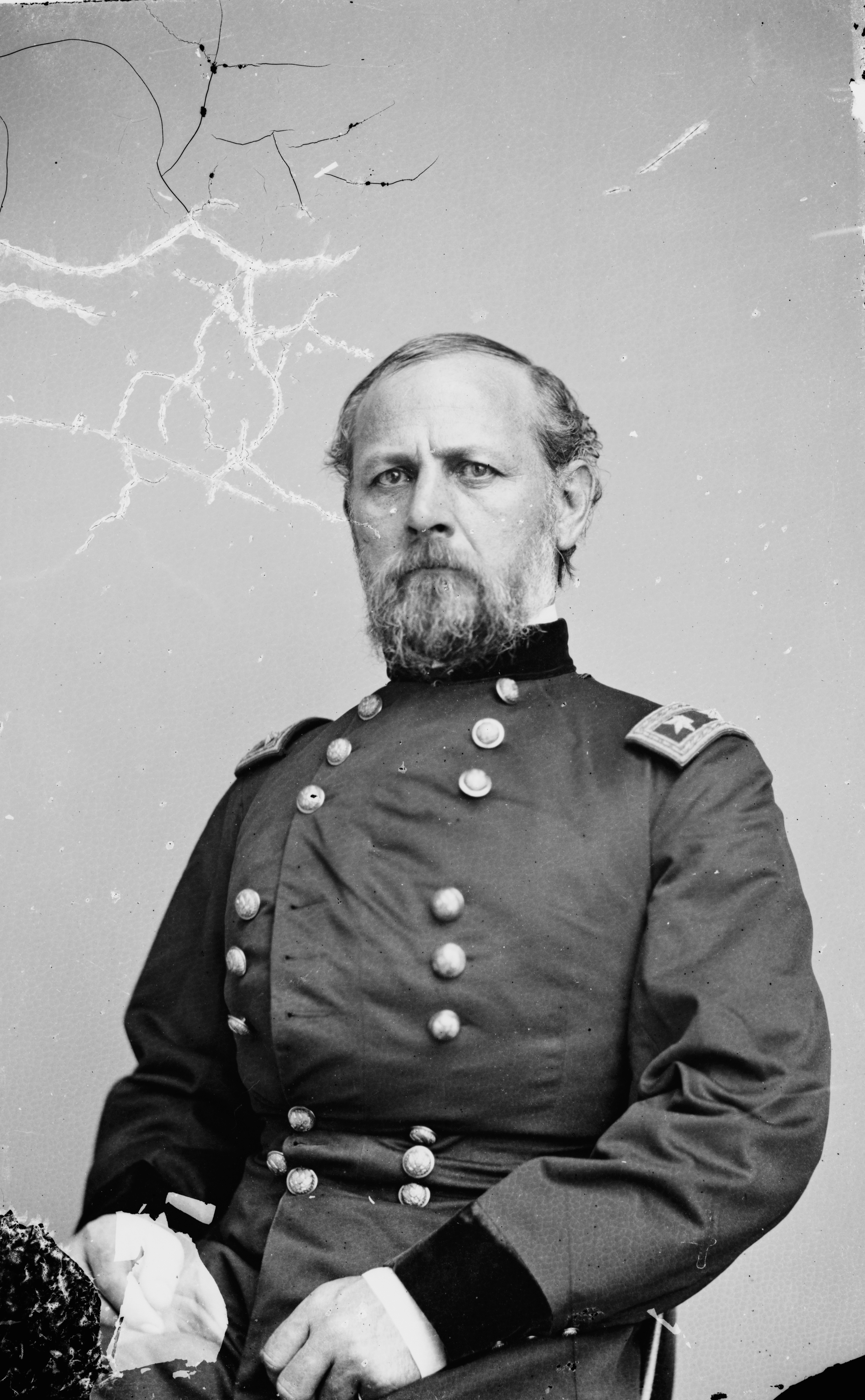 Gen. D. C. Buell